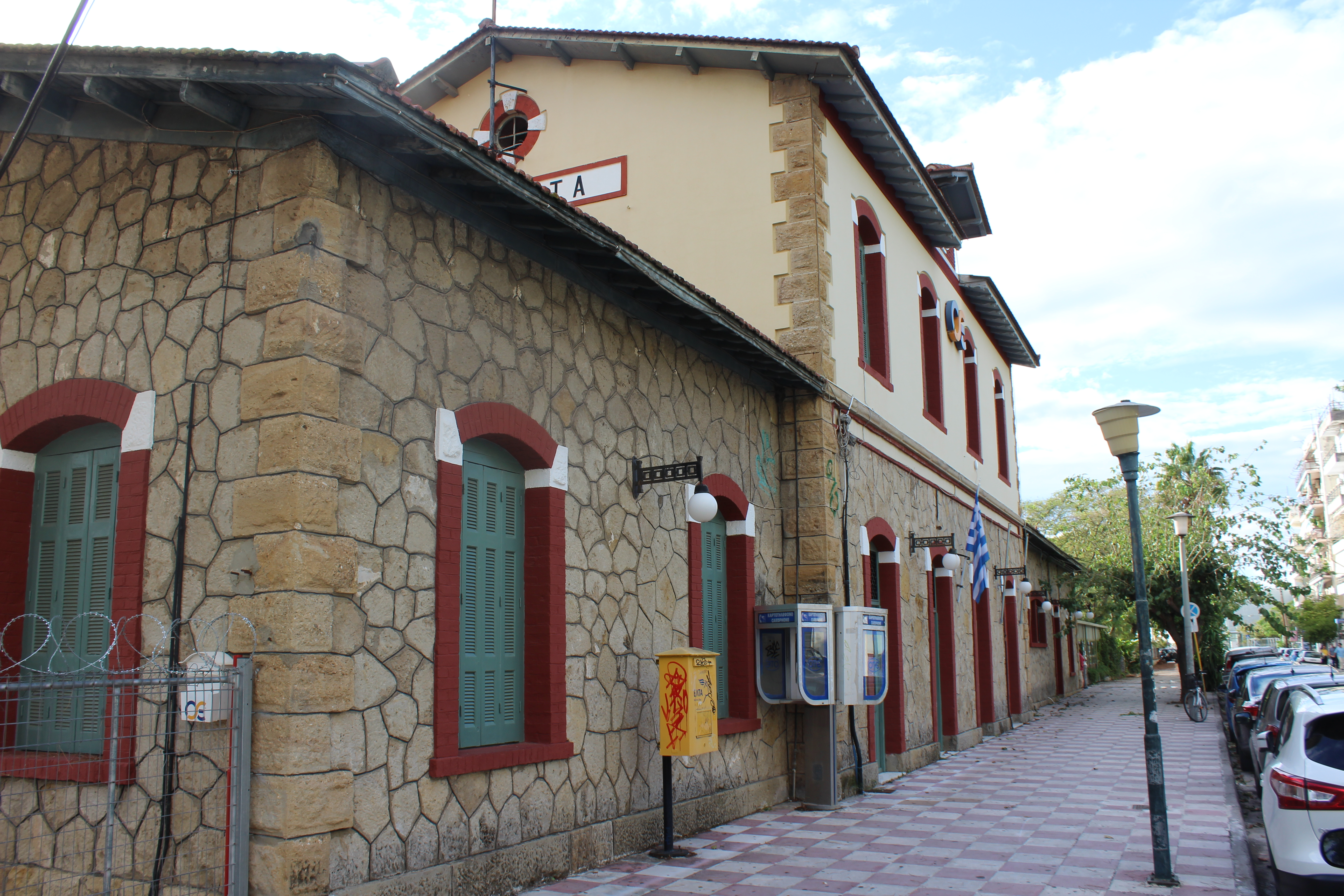 Σιδηροδρομικός σταθμός Καλαμάτας«Σιδηροδρομικός σταθμός Καλαμάτας»